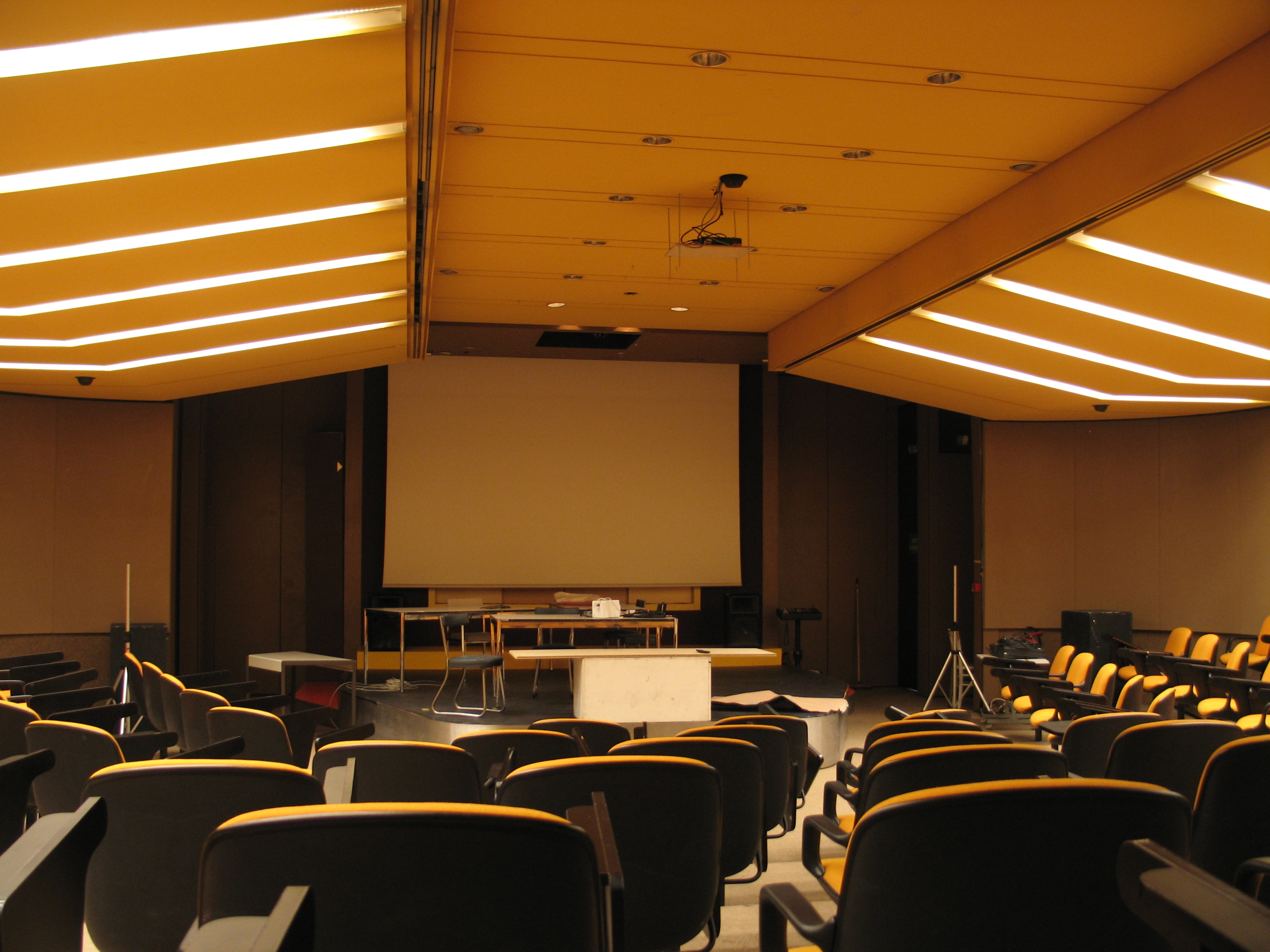 salle de type amphithéâtre